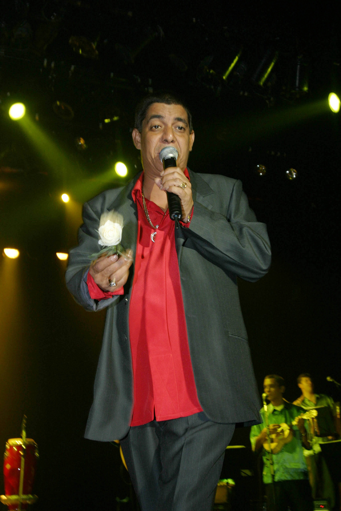 02/12/2003 - Lançamento do Cd das Escolade de Samba do Grupo Especial no Canecão. Na foto, Zeca Pagodinho. Foto de Andréa Farias